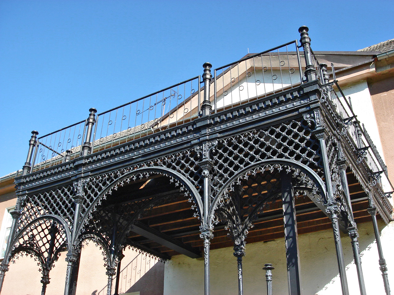 Herrenhaus von Brunn (Mecklenburg) bei Altentreptow, Landkreis Mecklenburgische Seenplatte, Mecklenburg-Vorpommern. Es wurde um 1800 im klassizistischen Stil errichtet. Von seiner Ursprungsgestalt kündet nicht mehr viel, außer dem gusseisernen Altan des Portals. Sonstige Fassadendetails wie Gesimsbänder und die alten Fenster wurden zu DDR-Zeiten entfernt. Heute beherbergt das Gutshaus altersgerechte Wohnungen, einen Kindergarten und einen Hort. (s. gutshaeuser.de)